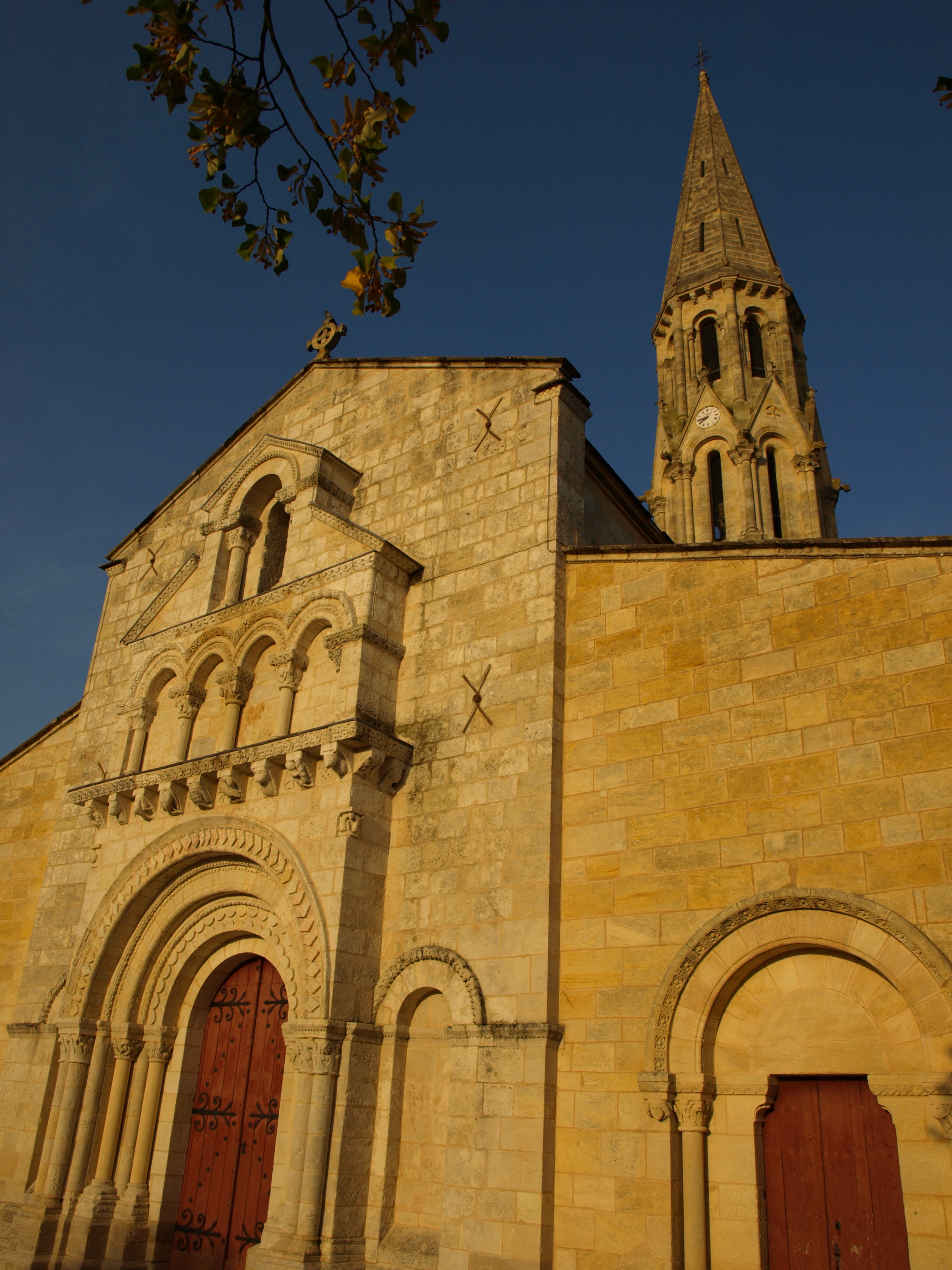 L'église Saint-Jean d'Etampes à la Brède en Gironde .